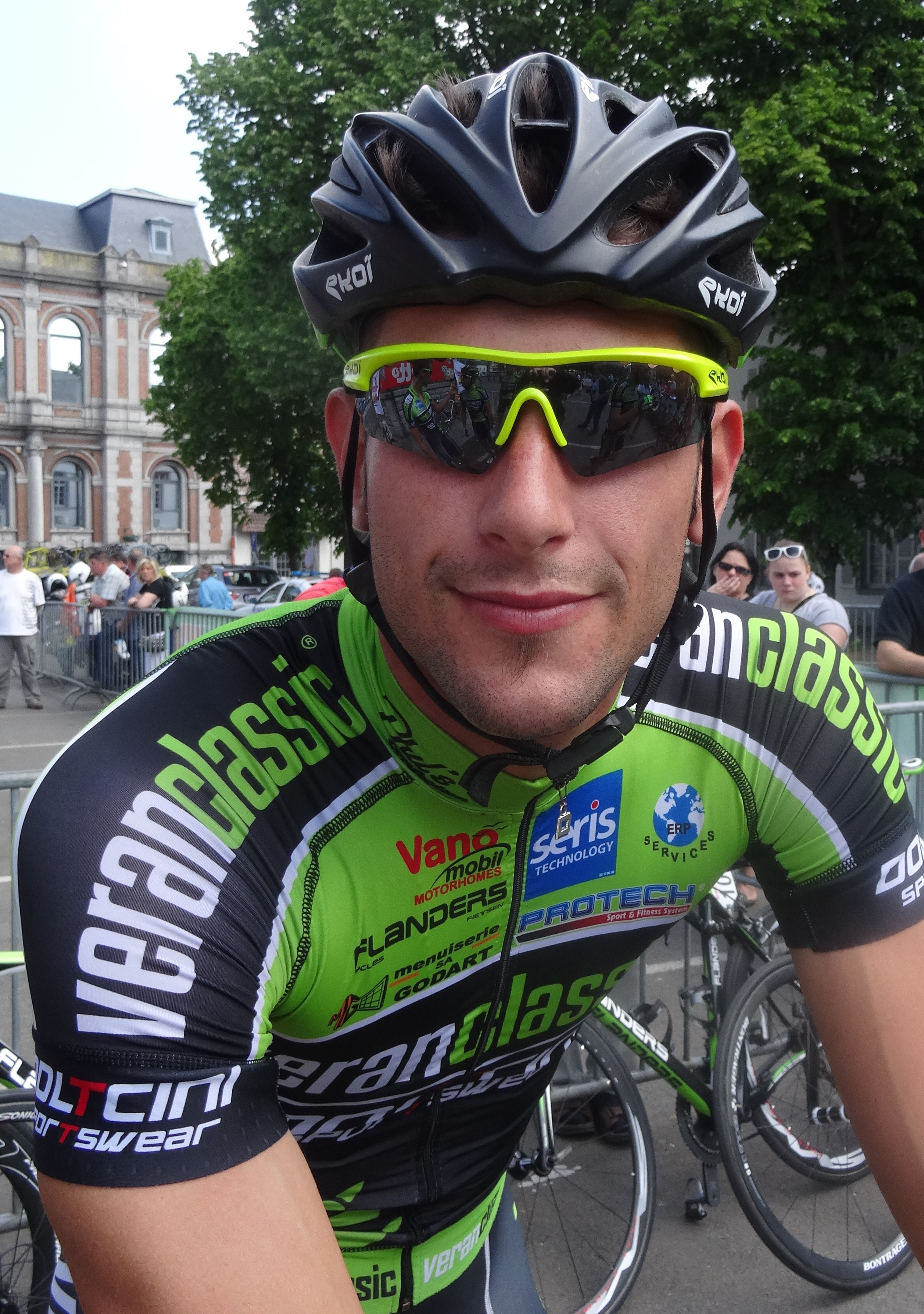 Reportage réalisé le samedi 17 mai à l'occasion du départ du Grand Prix Criquielion 2014 à Boussu, Belgique.